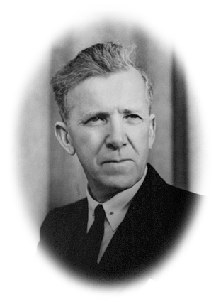 Ordfører Førde